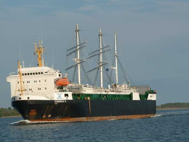 Condock V mit der Gorch Fock vor Stralsund